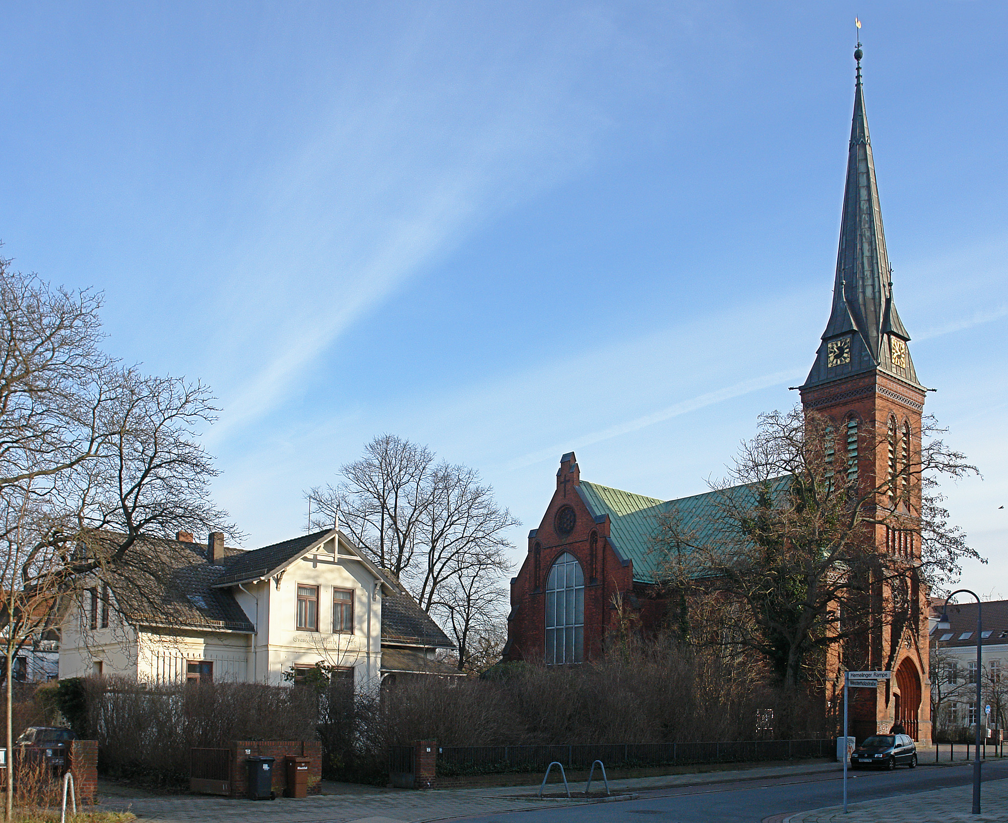 Ev. Kirche und Pastorenhaus Hemelingen in Bremen, Westerholzstraße 17. Die Gesamtanlage ist ein geschütztes Kulturdenkmal in der Freien Hansestadt Bremen, mit der Nr. 1204 beim Landesamt für Denkmalpflege registriert.